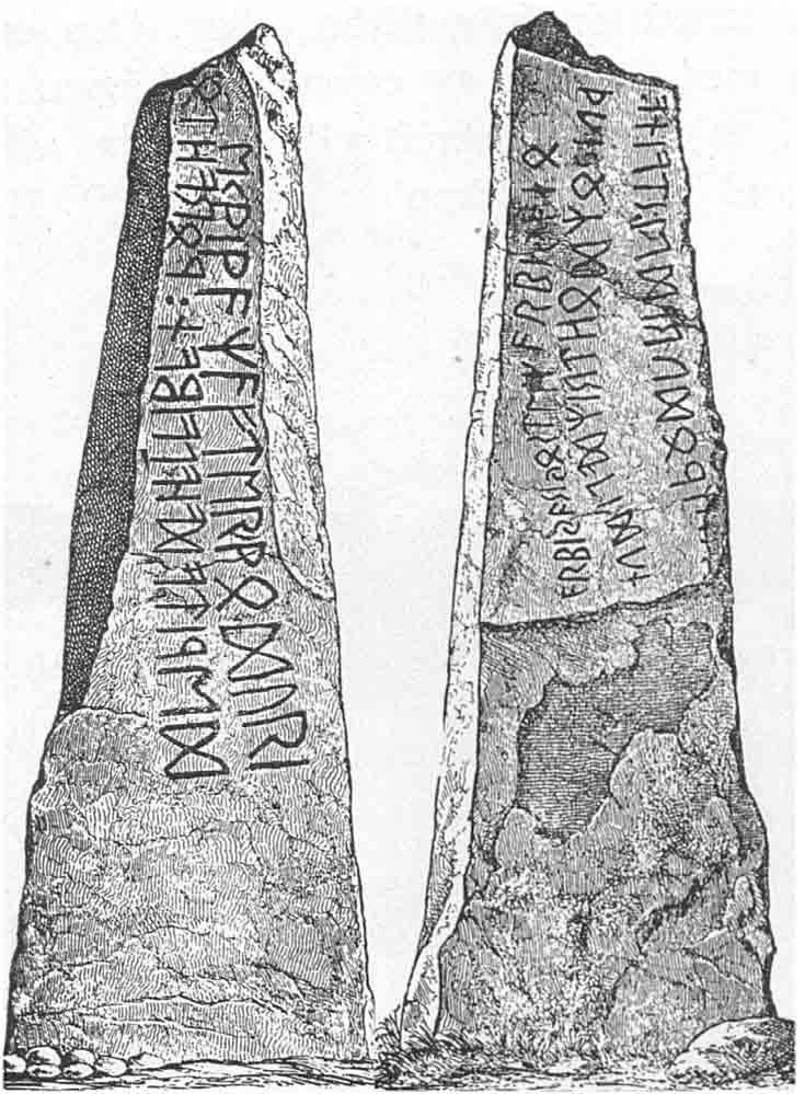 Tunesteinen. Tegning av steinen med begge siders ristninger. Gjengitt etter Nordisk Kultur bd. 6, Runorna, 1933. av Opphavsperson ukjent.